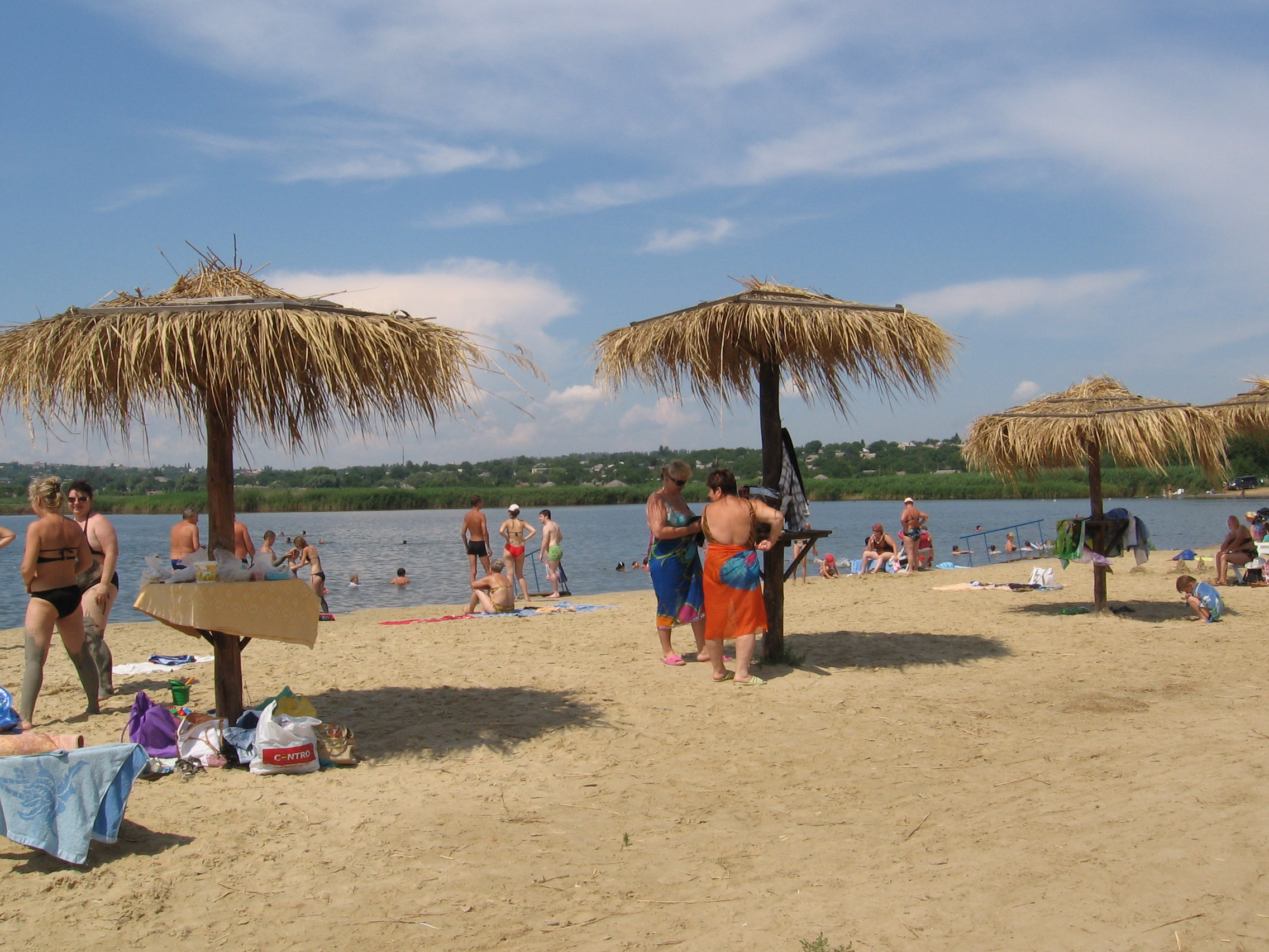 Словянськ: Фото